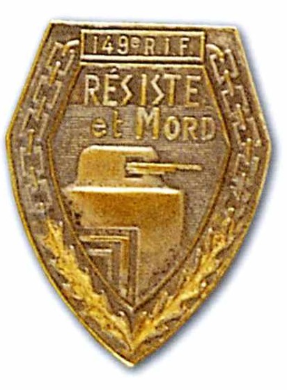 insigne régimentaire du 149e RMIF